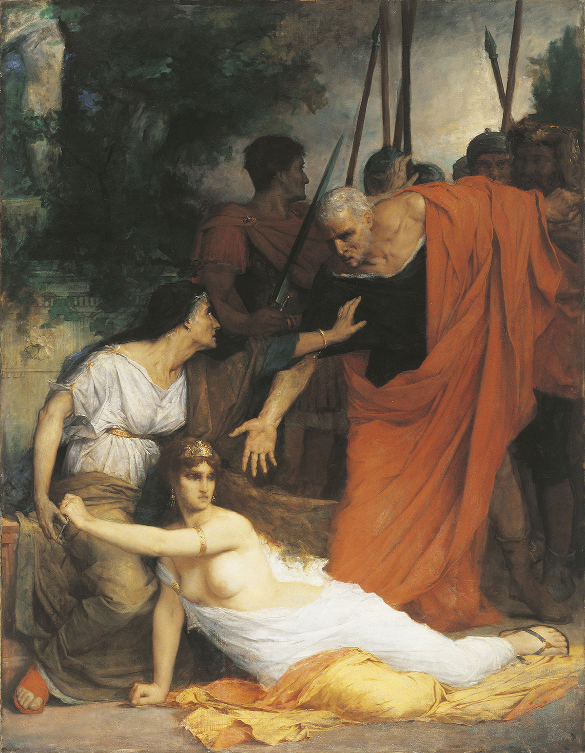 Jacques François Fernand Lematte, La mort de Messaline, 1870, Paris, Ecole Nationale Supérieure des Beaux-Arts, inventaire PRP 121, / MU 3004. Huile sur toile, dimensions 145x113 cm